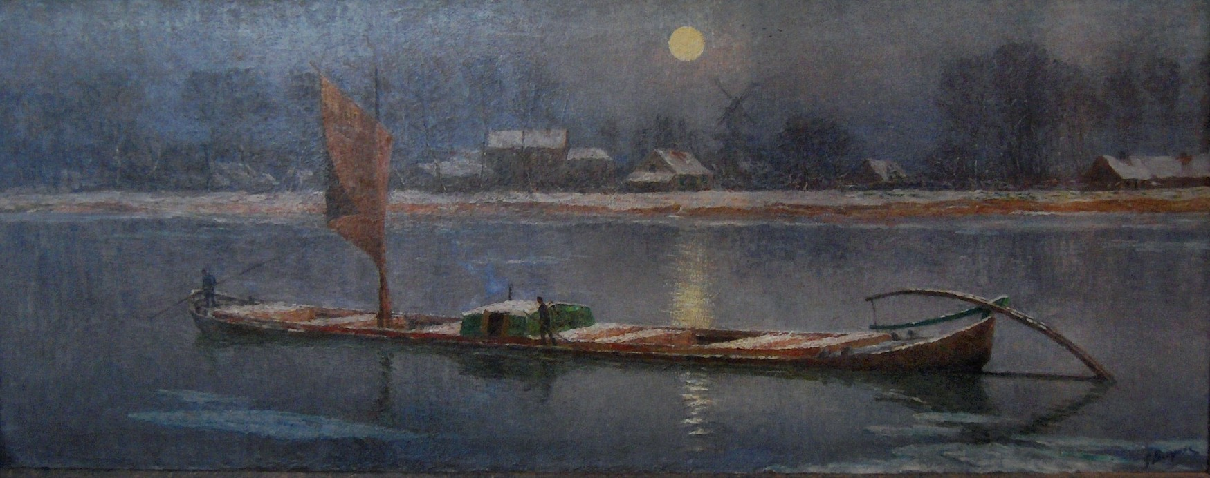 "Kanaal Gent-Terneuzen in de winter "; olieverf op doek door Georges Buysse (1864-1916); 92 x 232 cm Museum van Deinze en de Leiestreek, België